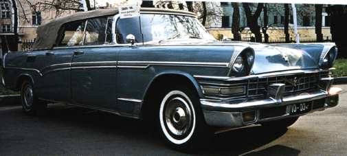 Soviet ZIL-111V (convertible)